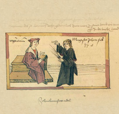 Volkacher Salbuch, Eid des Schulmeisters, folio 407r